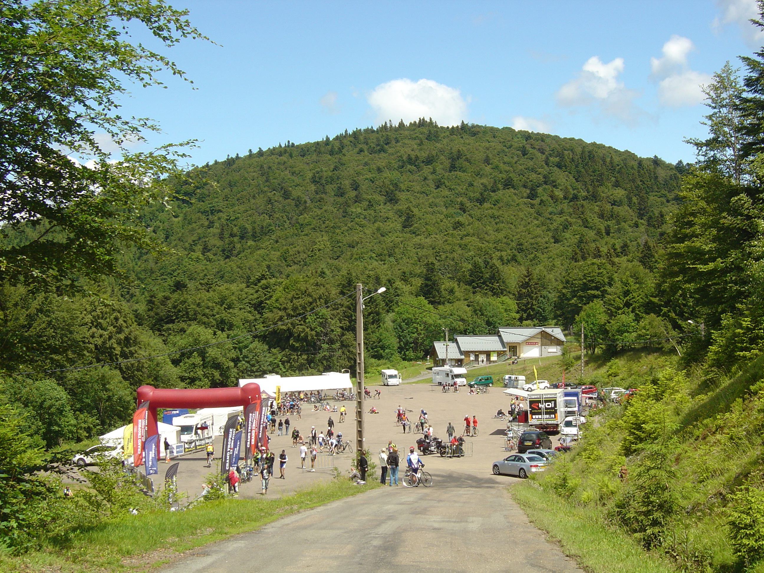 Grand parking de la Planche des Belles-Filles le jour de la cyclosportive Les Trois Ballons